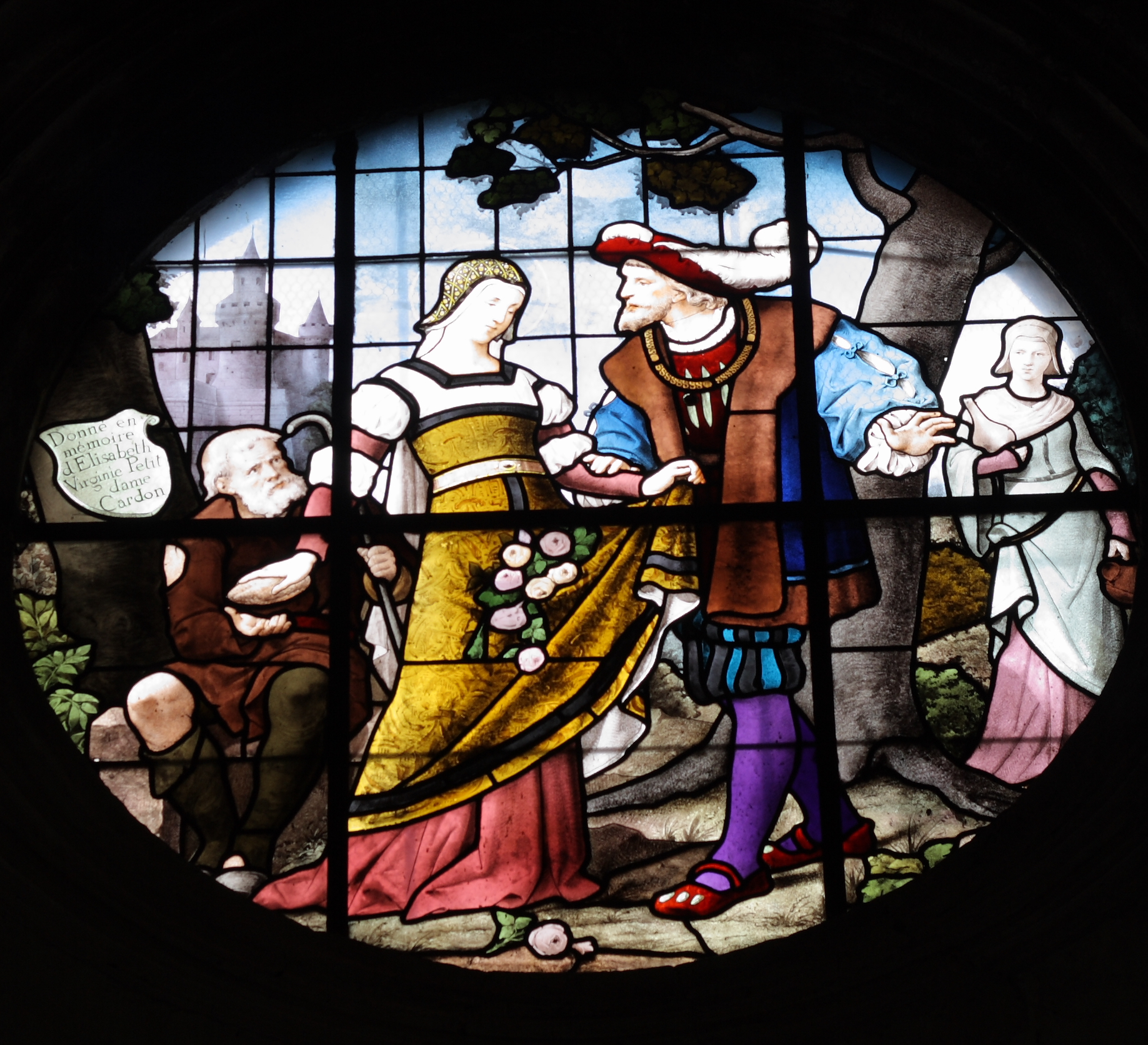 Bleiglasfenster Nr. 22 in der katholischen Pfarrkirche Saint-Pierre in Montfort-l’Amaury, Darstellung: hl. Elisabeth von Thüringen (siehe Laurence de Finance, Marie-Huguette Hadrot: Les verrières de l'Église paroissiale Saint-Pierre, Inventaire général S.P.A.D.E.M., 1994)